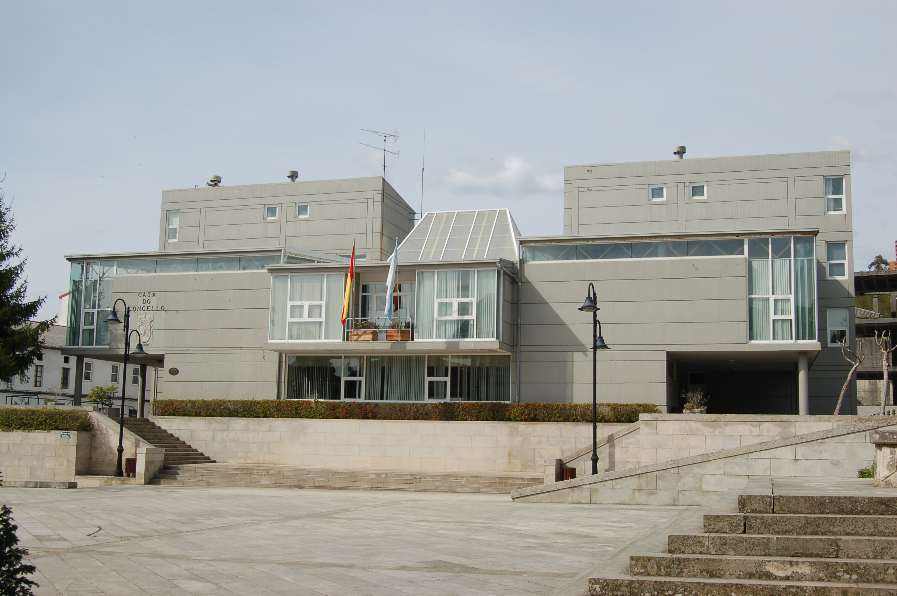 Casa do concello de Forcarei